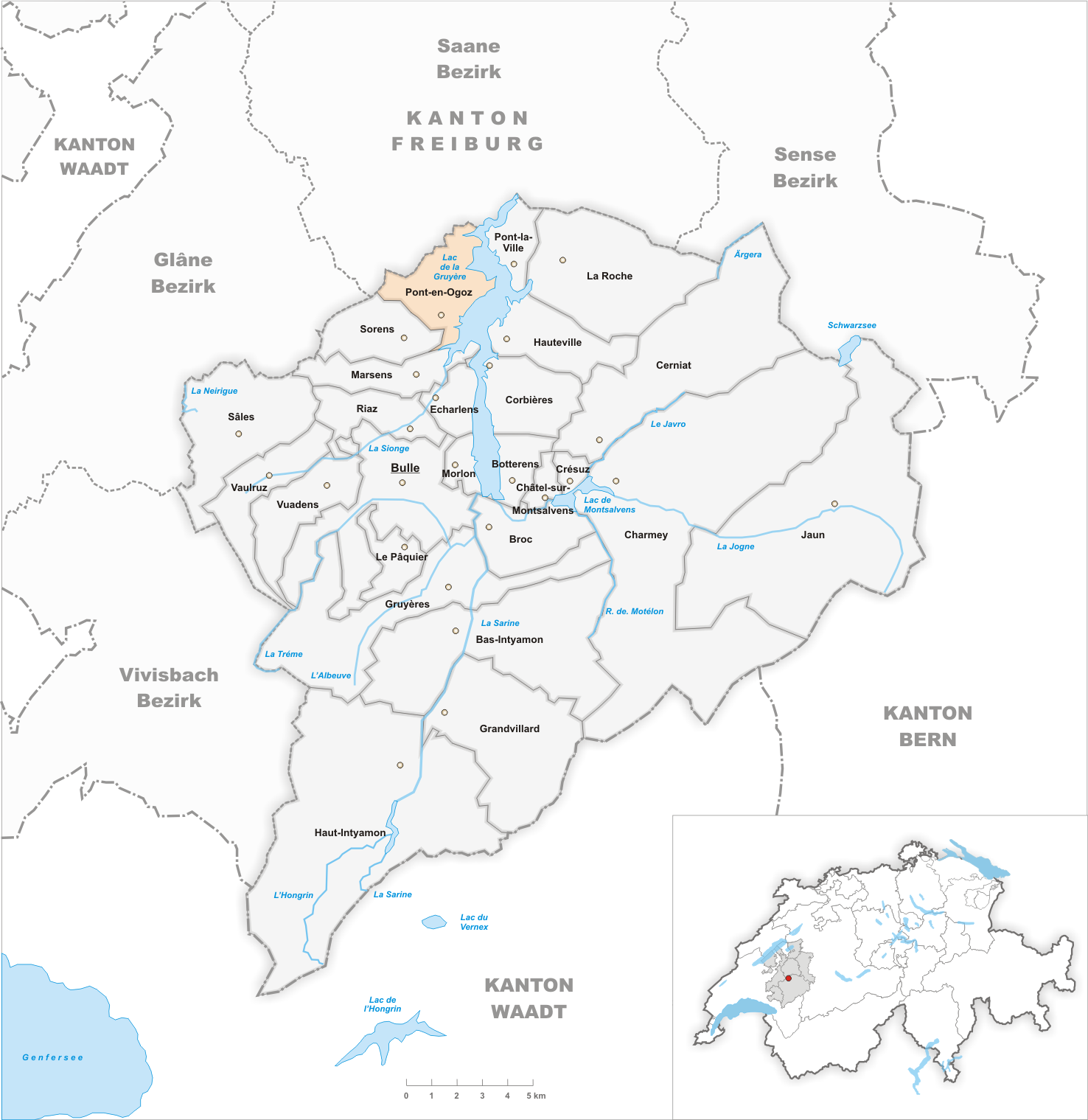 Municipality Pont-en-Ogoz